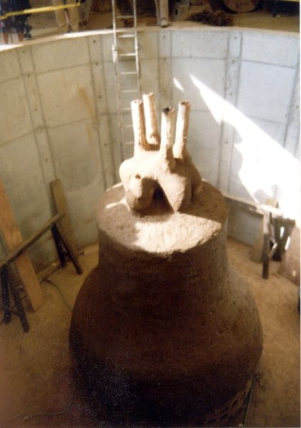 Eine Glockengussform.